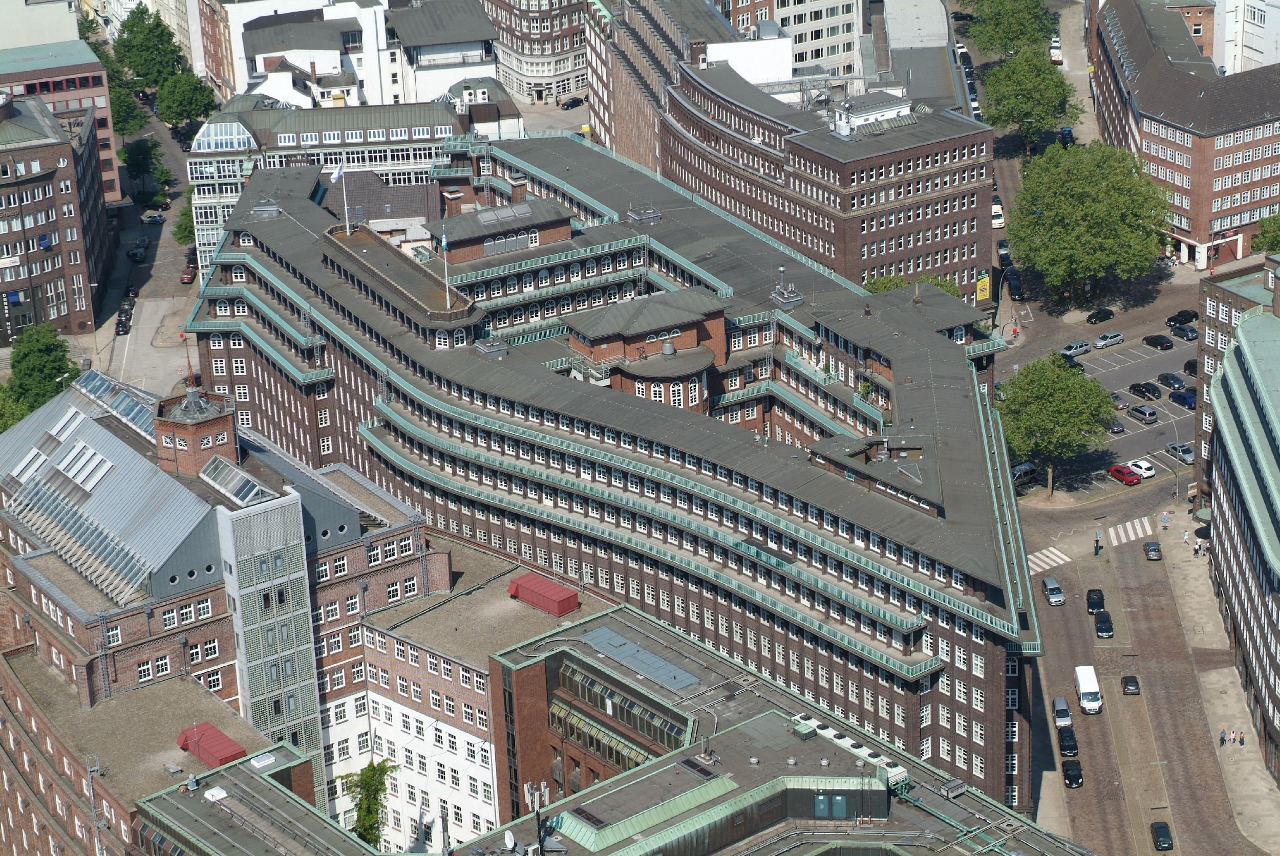 Projekt Heißluftballon